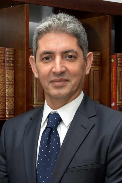 Sr. Reda Mansour (رضا منصور, רדא מנצור) é o embaixador mais jovem na história de Israel. Ele serviu como Embaixador de Israel no Equador; Embaixador-Adjunto na Embaixada de Israel em Portugal; Vice-Cônsul Geral no Consulado de Israel em San Francisco e Cônsul Geral no Consulado de Israel em Atlanta. Desde agosto de 2014 Dr. Reda Mansour é o Embaixador de Israel no Brasil.